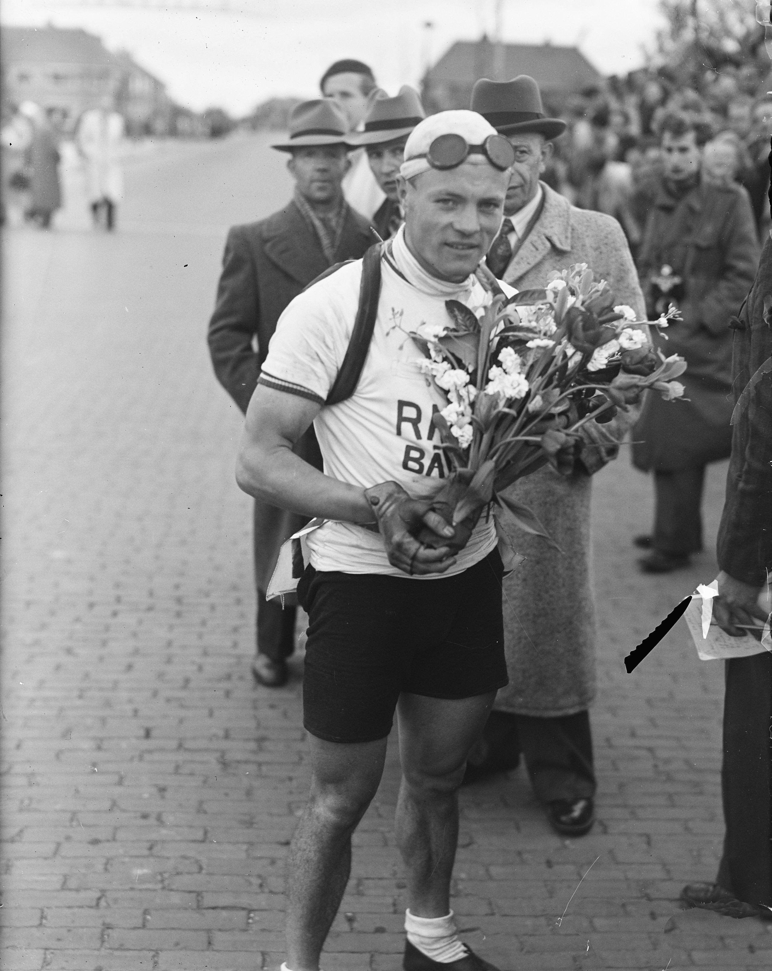 Collectie / Archief : Fotocollectie Anefo Reportage / Serie : [ onbekend ] Beschrijving : Ronde van Nederland op Afsluitdijk Datum : 5 mei 1949 Trefwoorden : kampioenen, wielrennen Fotograaf : Noske, J.D. / Anefo Auteursrechthebbende : Nationaal Archief Materiaalsoort : Glasnegatief Nummer archiefinventaris : bekijk toegang 2.24.01.09 Bestanddeelnummer : 903-3653